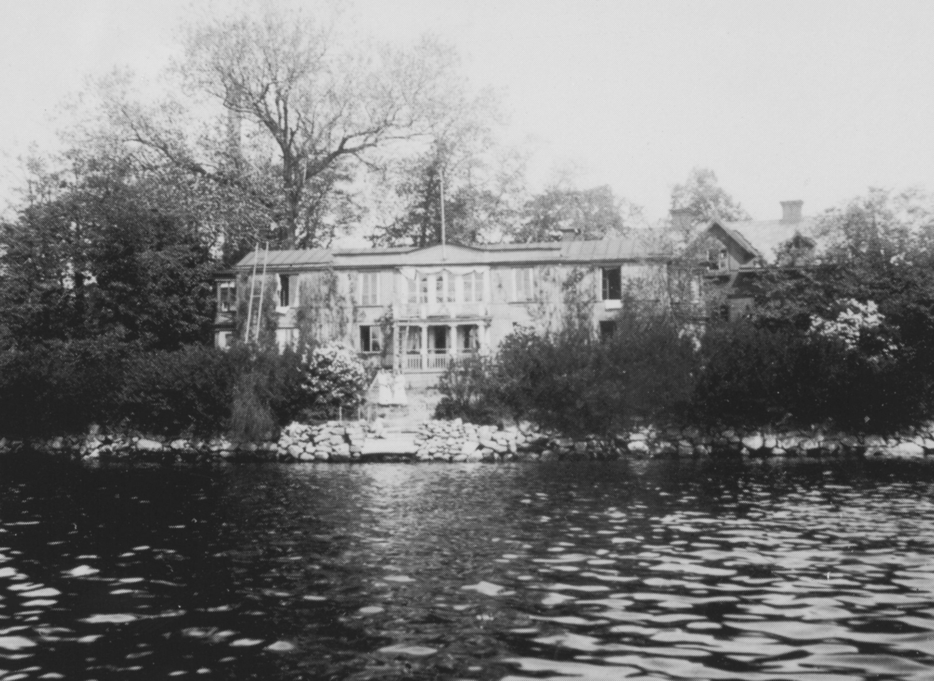 Smedsudden, Sjövillan på 1920-talet, brann ner 1936. Bakom syns Krügerska villan som brann ner 1997.